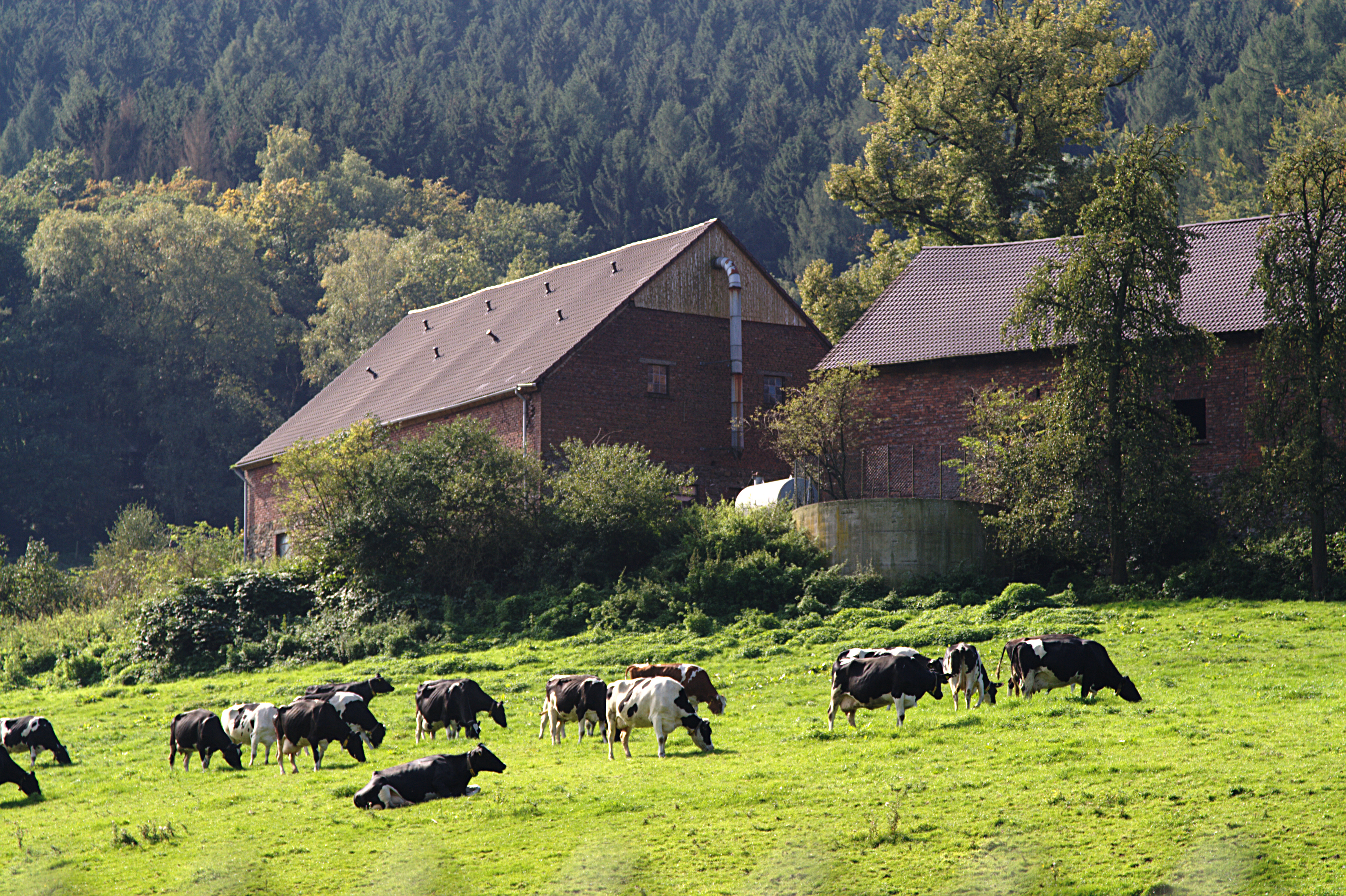 Hofgebäude Auf dem Killing 4, Hagen-Selbecke, Mäckingerbachtal, Milchkühe auf der Weide; abgebildeter Bereich gelegen im Landschaftsschutzgebiet „Rafflenbeuler Kopf“